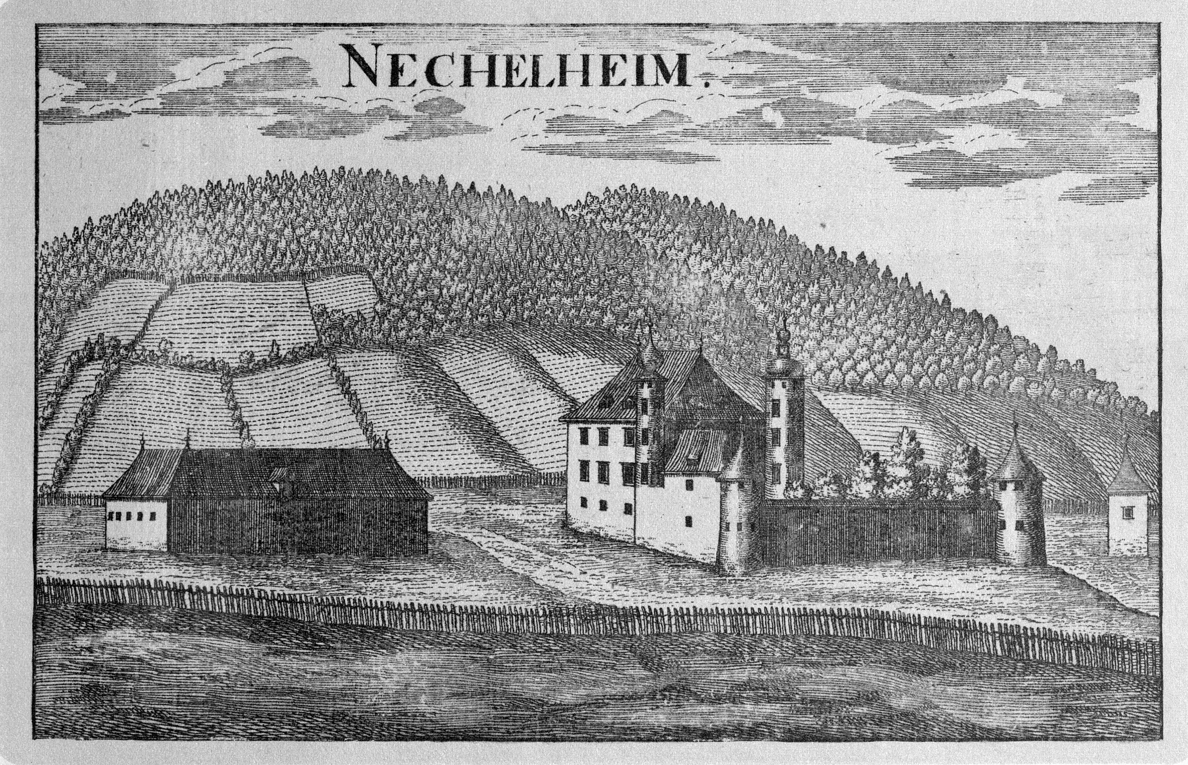 G. M. Vischers Käyserlichen Geographi, Topographia Ducatus Stiriae, Das ist: Eigentliche Delineation / und Abbildung aller Städte / Schlösser / Marcktfleck / Lustgärten / Probsteyen / Stiffter / Clöster und Kirchen / so es sich im Herzogthumb Steyrmarck befinden; Und anjetzo Umb einen billichen Preyß zu finden seynd Bey Johann Bitsch Universitäts Buchhandlern / Auff dem Juden=Platz bey der guldenen Saulen. Graz 1681 Die Nummerierung der Dateien folgt der alphabetischen Reihung der Ortsnamen